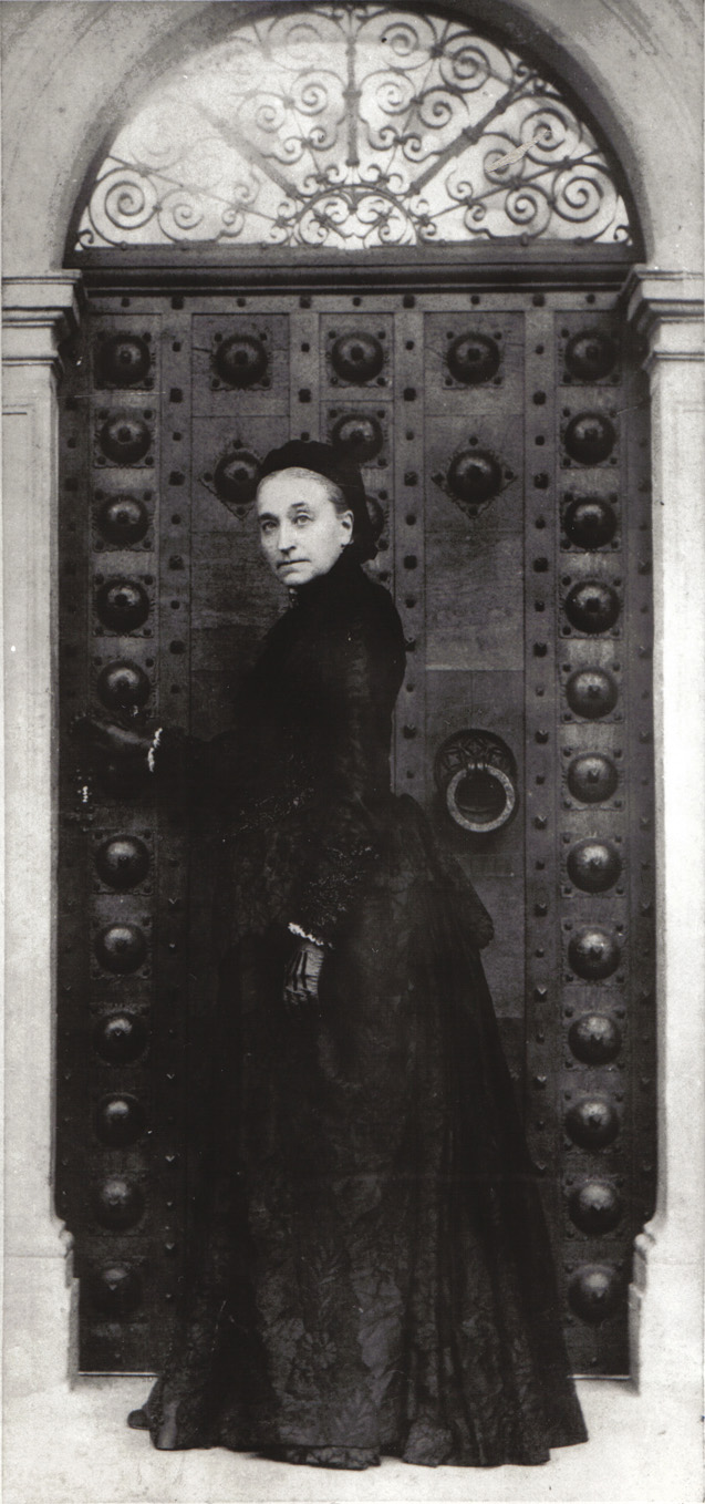 Księżna Izabella z Czartoryskich Działyńska przed drzwiami wejściowymi do gołuchowskiego zamku